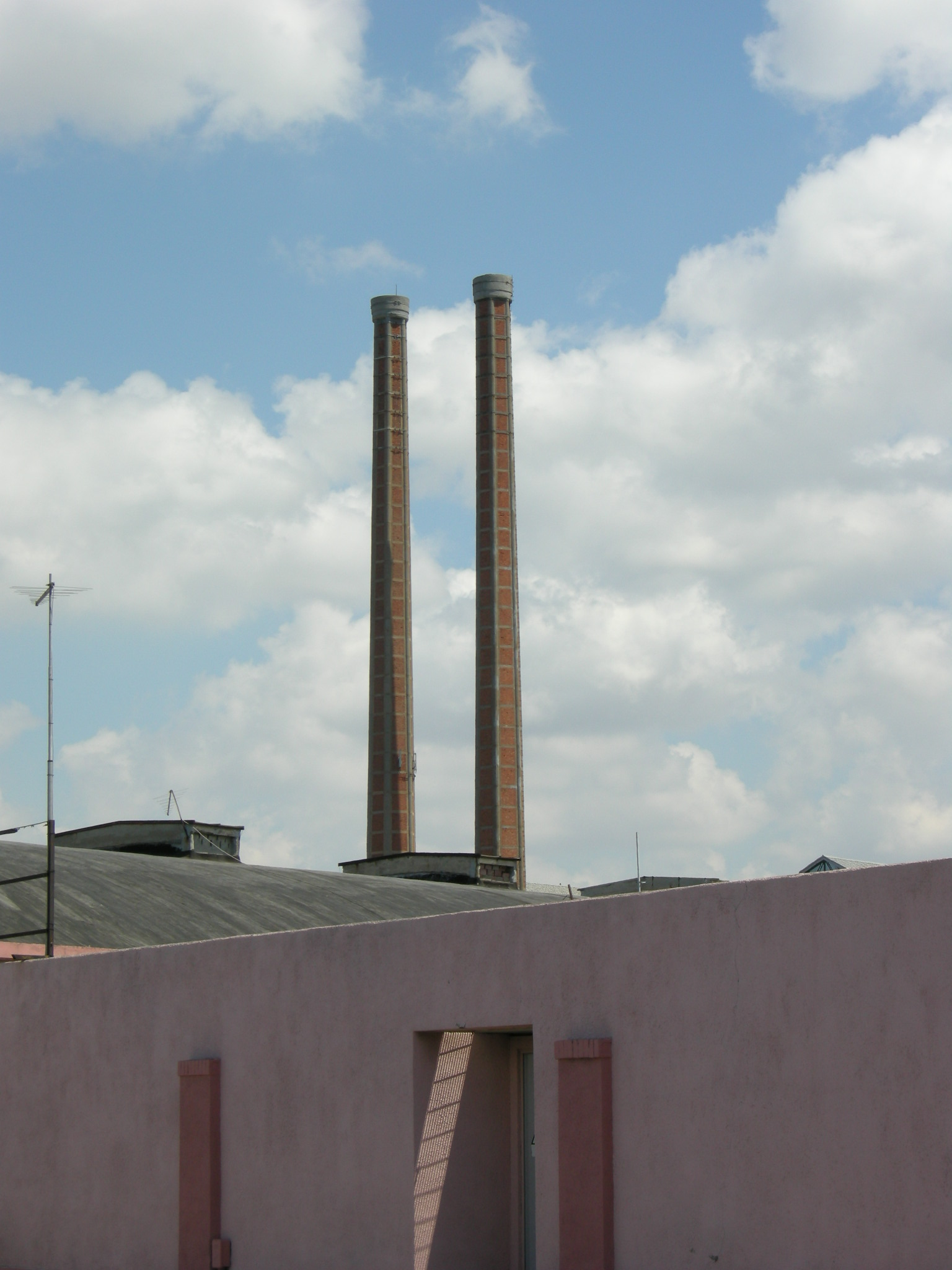 Livorno, ciminiere